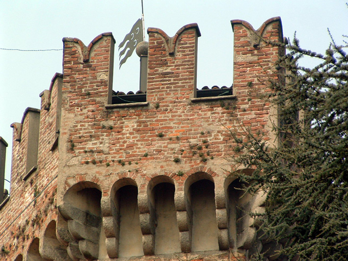 Autore:Marrabbio2